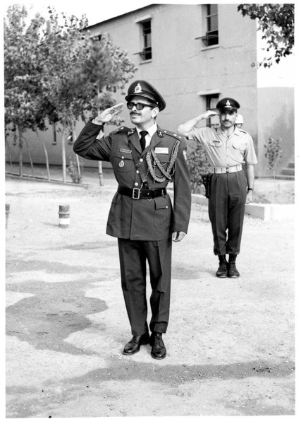 تيمسار فربد در زمان رياست ستاد ارتش